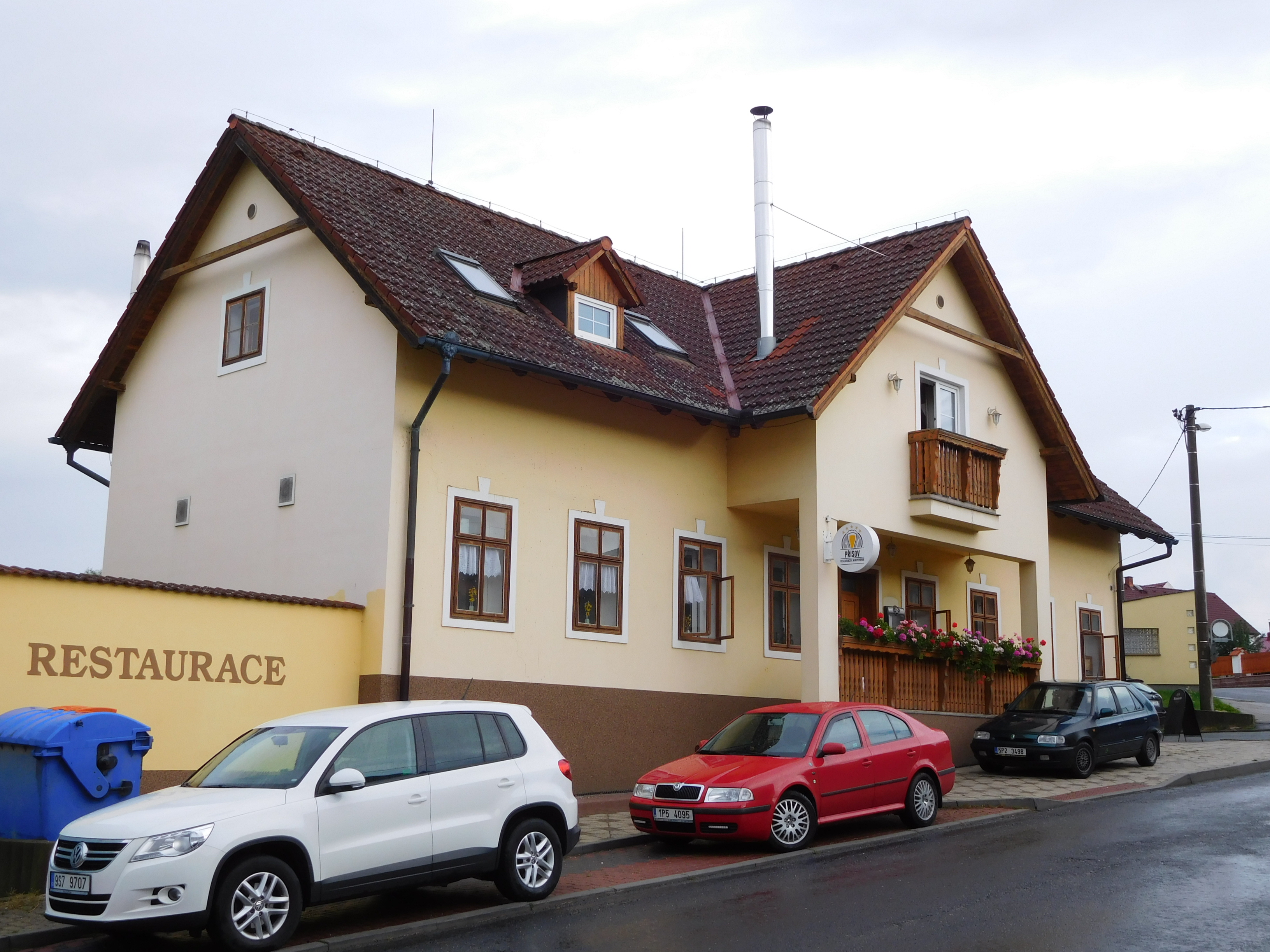 Příšov - dům č.p. 30 (restaurace + minipivovar)